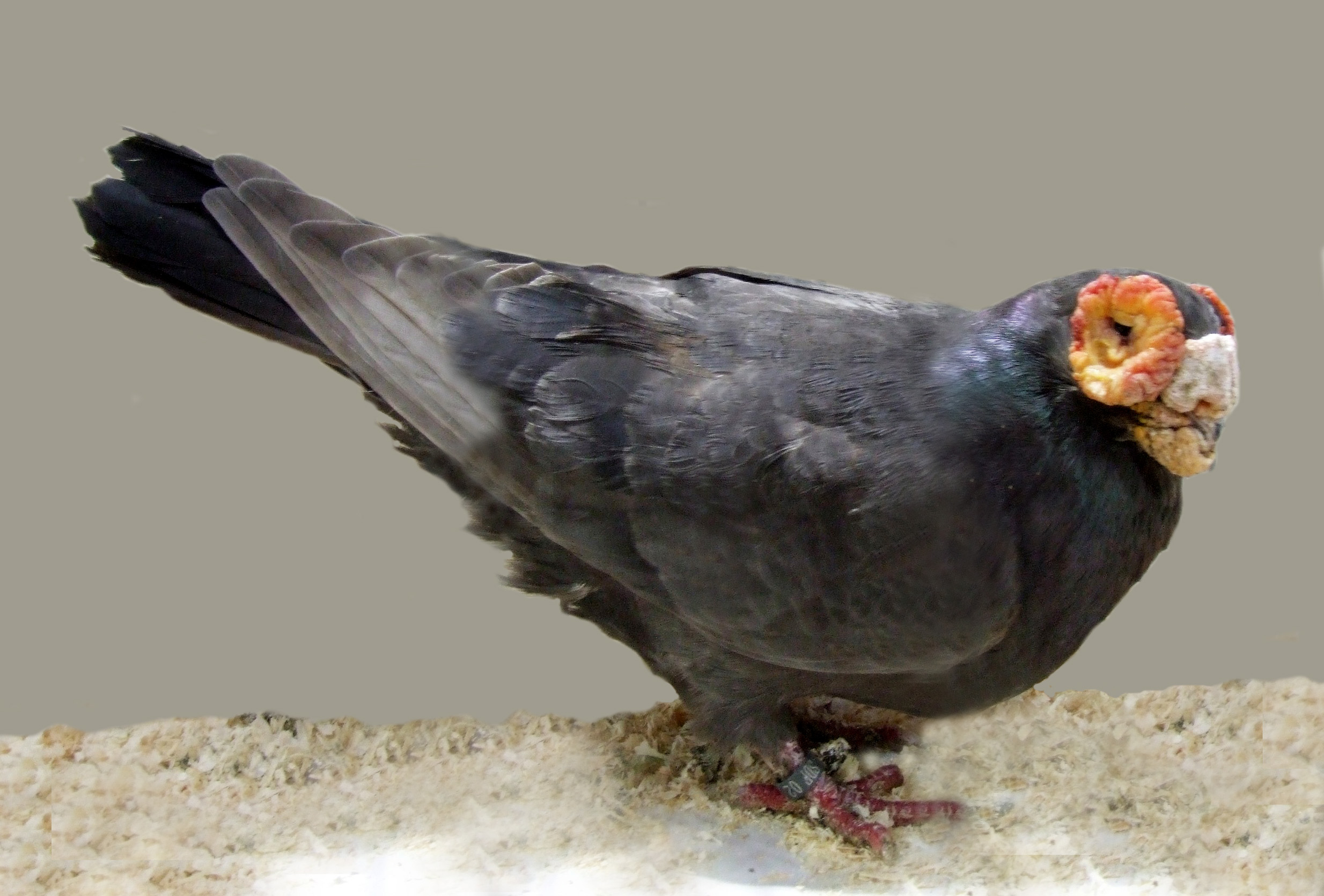 A black Barb pigeon. Photo by jackie brooks/jim gifford